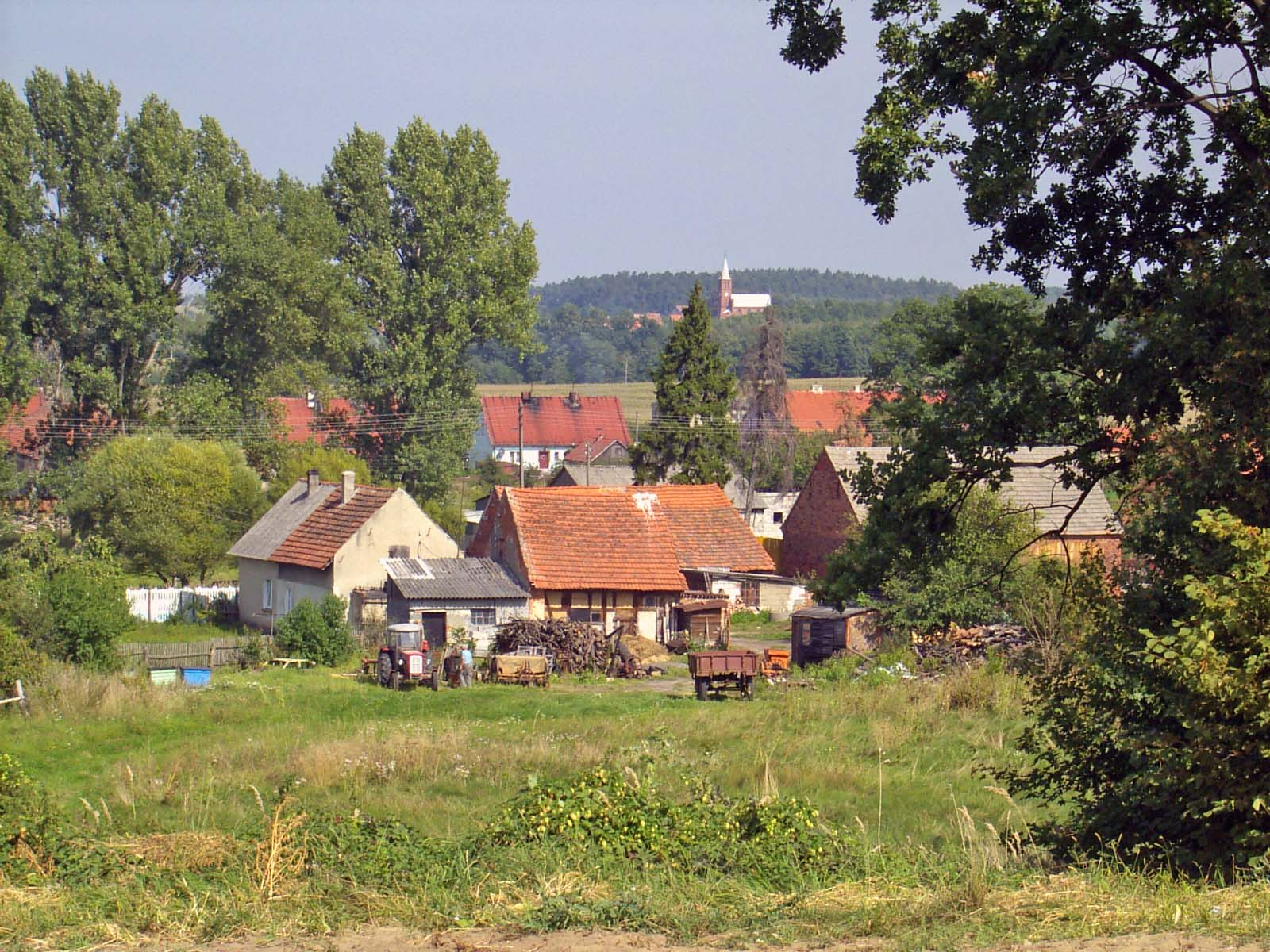 Panorama wsi.